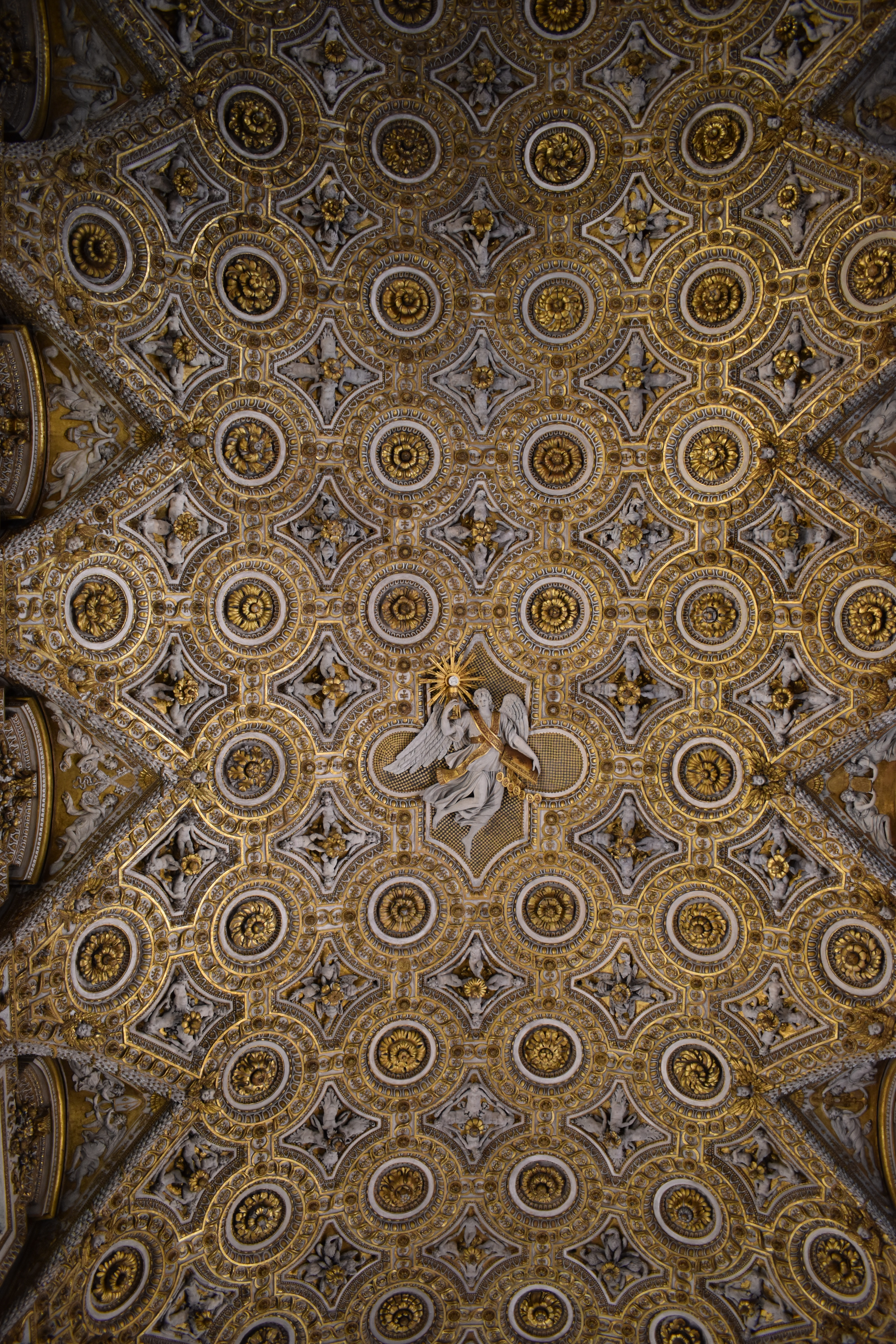 Martino Ferrabosco, soffitto cappella Paolina palazzo del Quirinale, 1616-1617, Roma